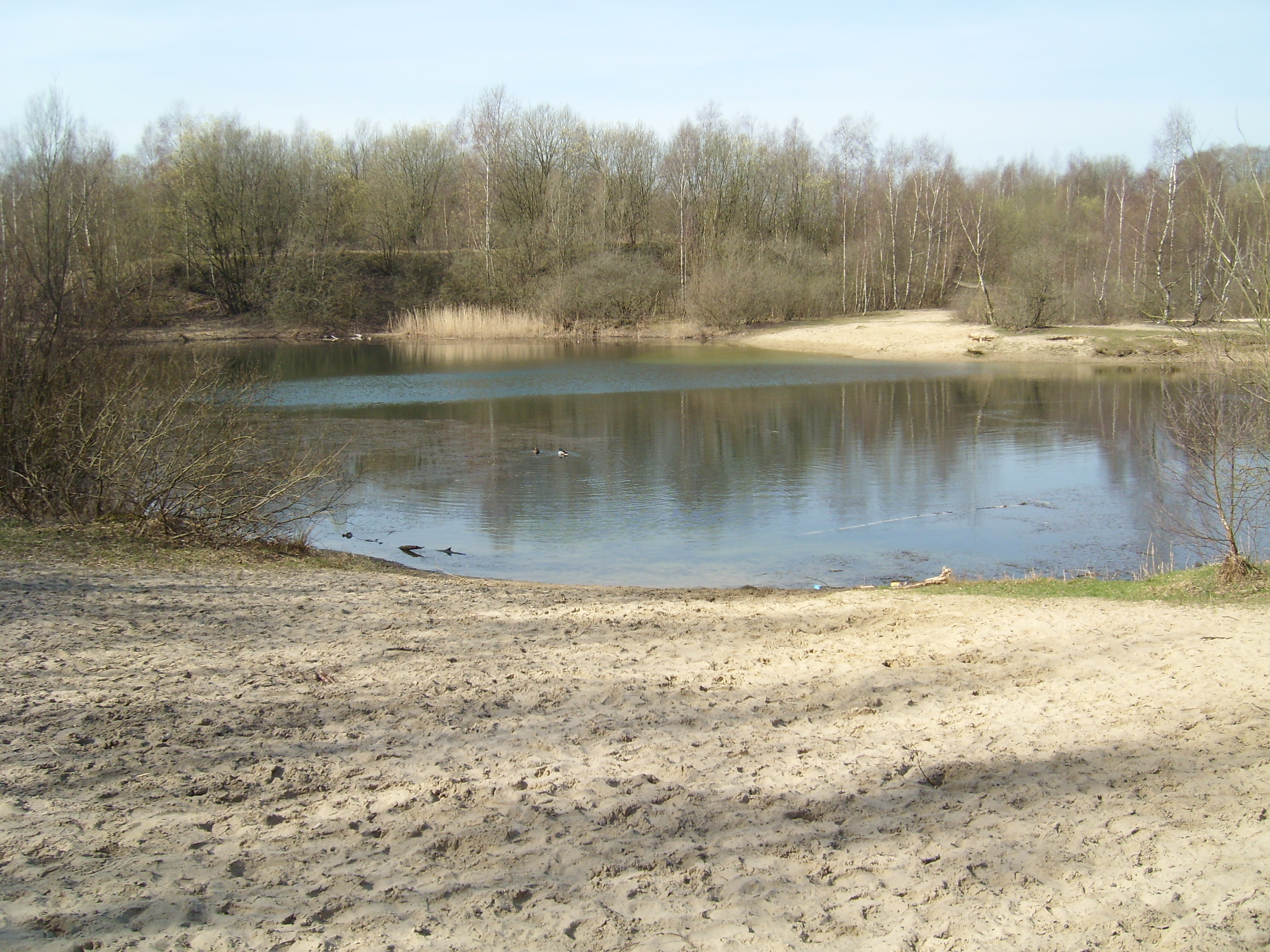 Der Restsee in der Kochkuhle